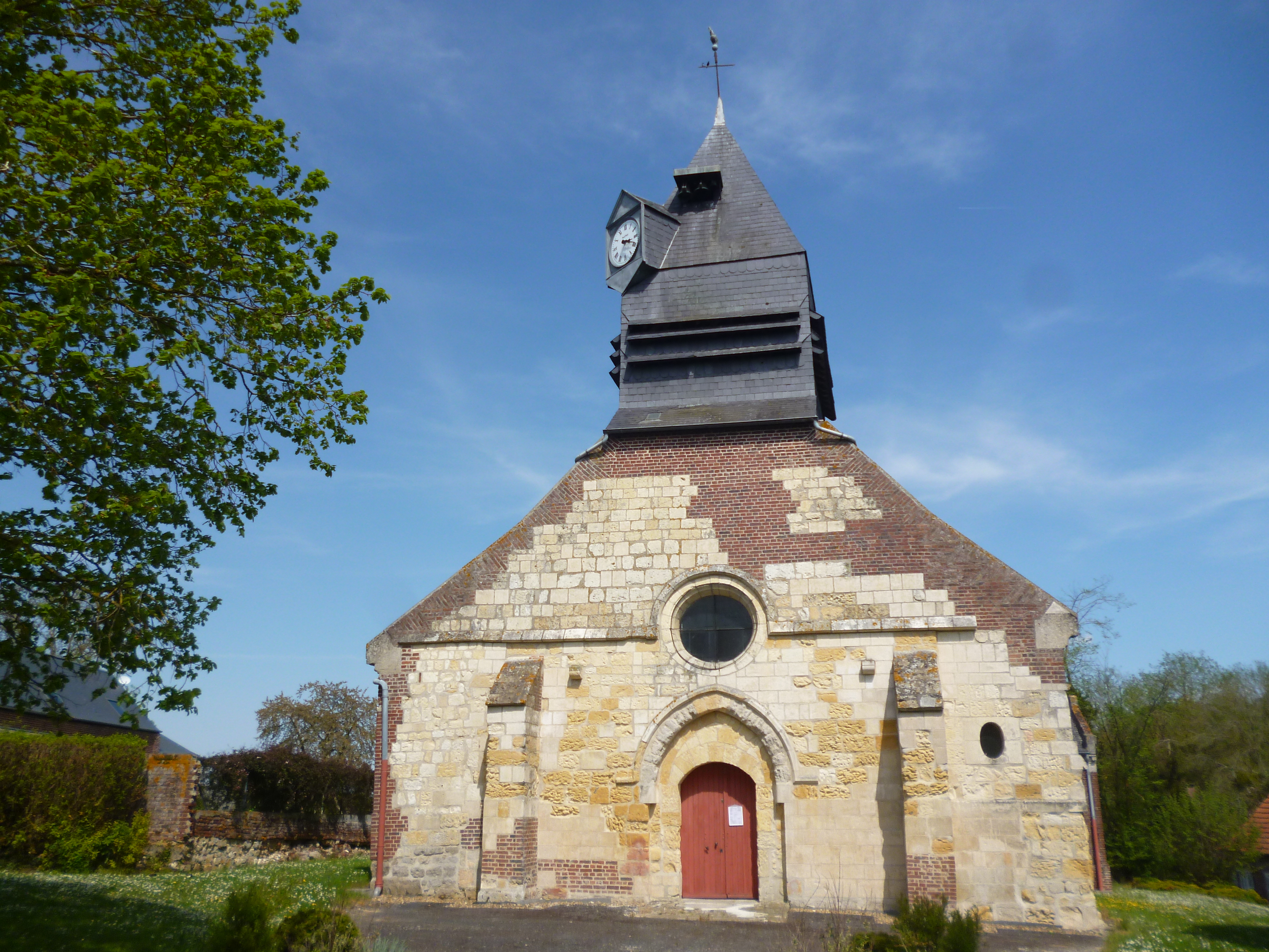 Eglise Saint-Pierre de Dompierre (Oise).